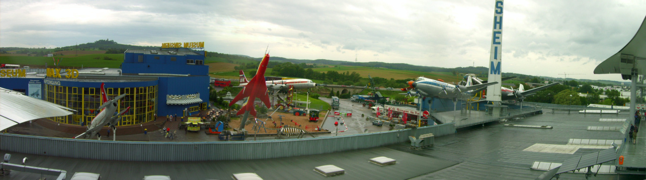 Außen-Panorama des Museums - Sicht vom "Flugdeck" / selbst fotografiert Schlixn / 20.05.2006 /